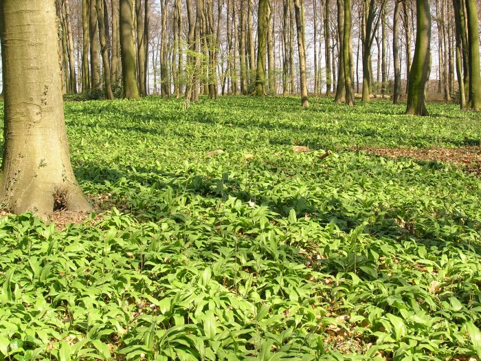 Ramsons in a forest (Bärlauchaspekt im Kalkbuchenwald)